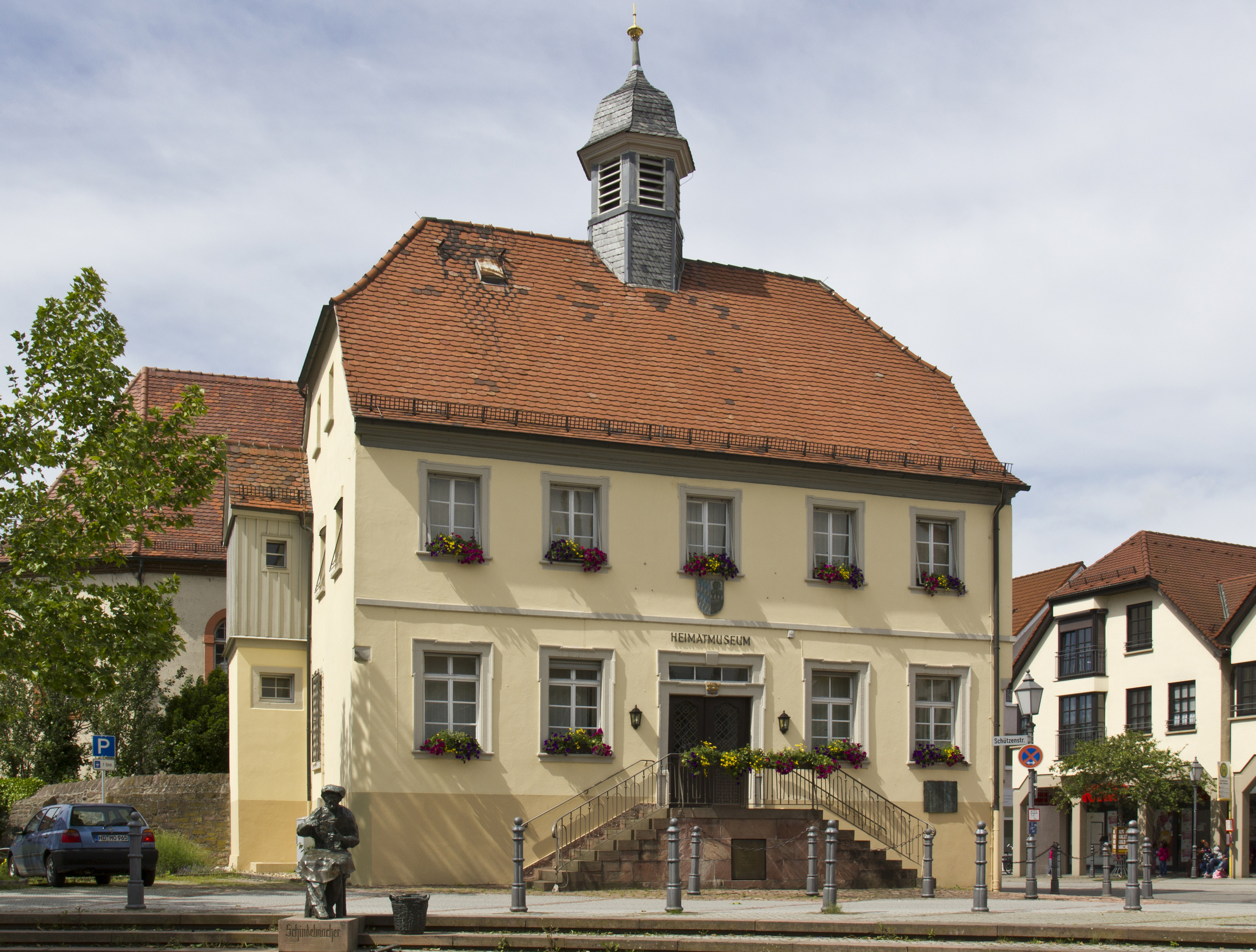 Sandhausen, Altes Rathaus, inzwischen genutzt als Heimatmuseum